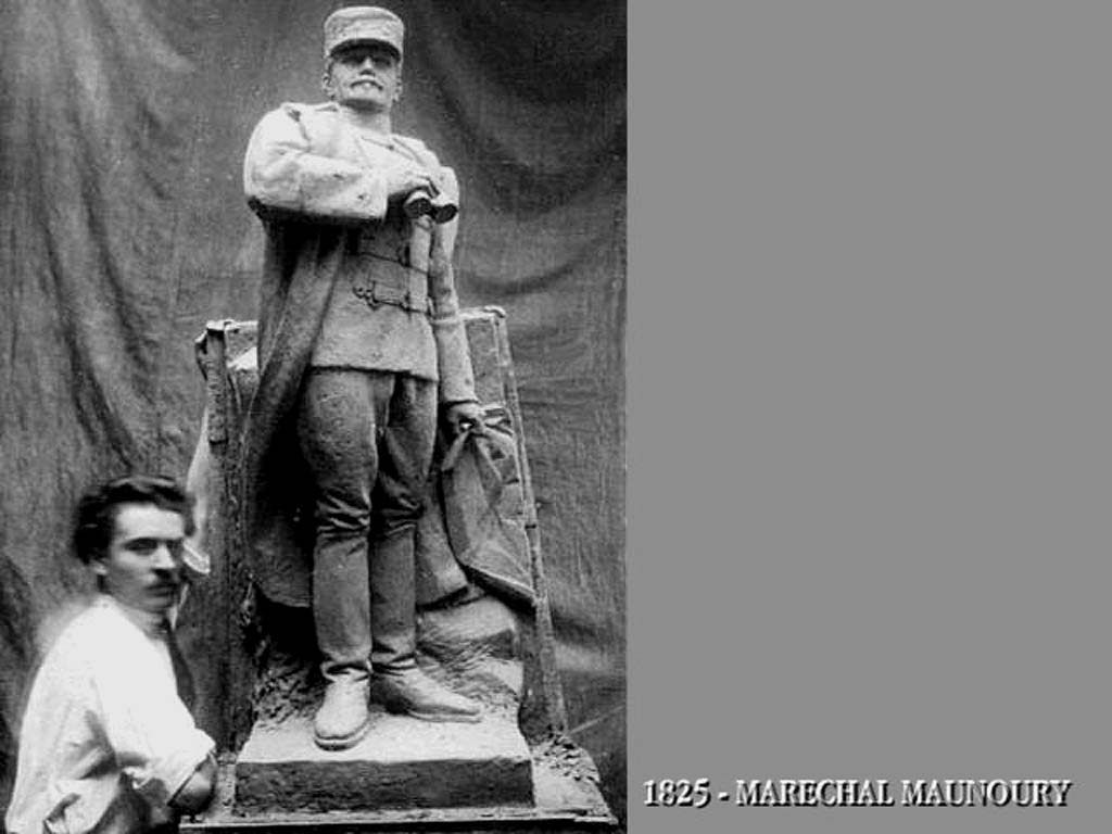 Sculpture sur pied